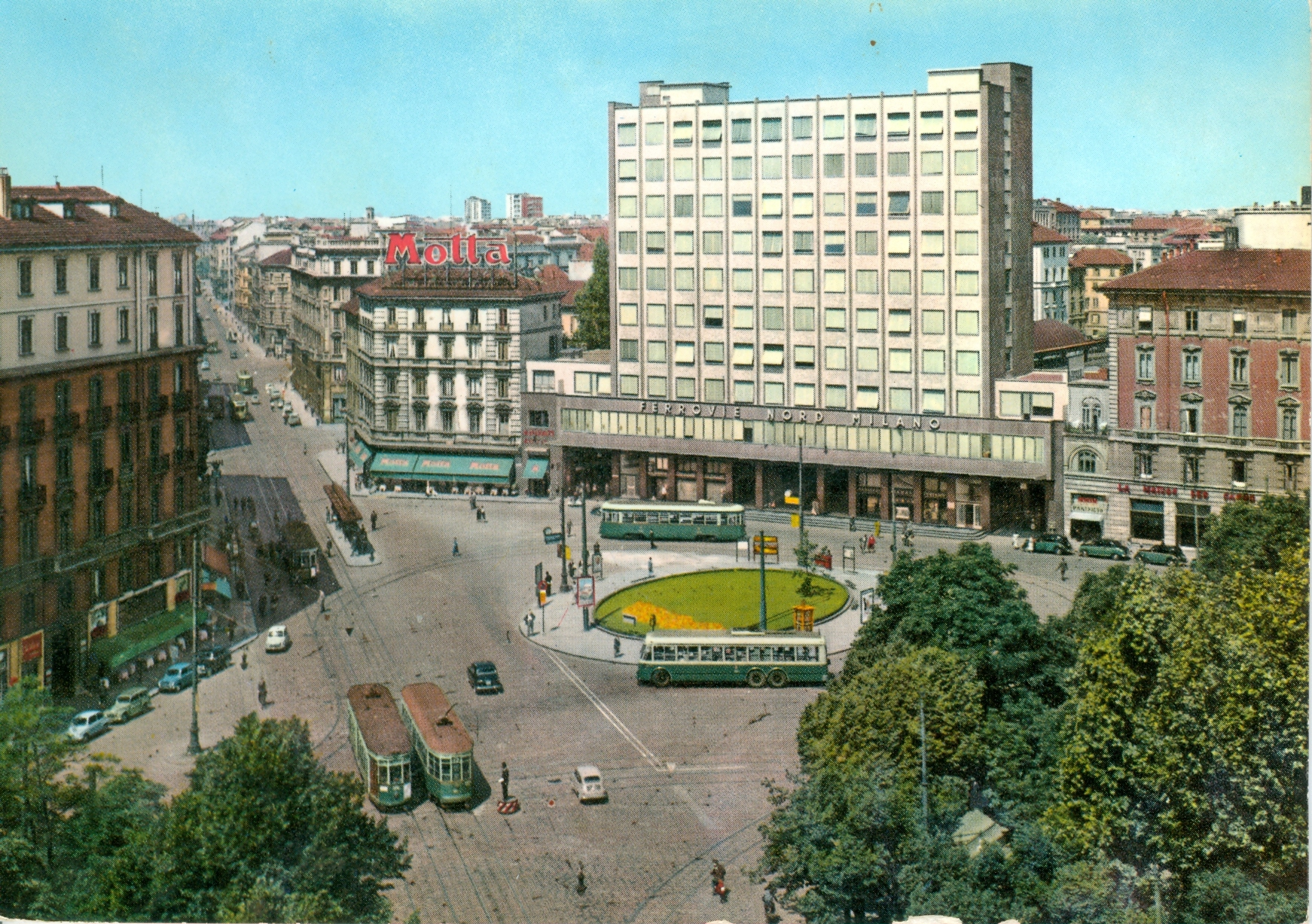 Vista di piazzale Cadorna a Milano prima della ristrutturazione della stazione firmata da Gae Aulenti. L'immagine è successiva al 1955 (anno di lancio della Fiat 600) e anteriore al 1964 (anno di apertura della metropolitana)